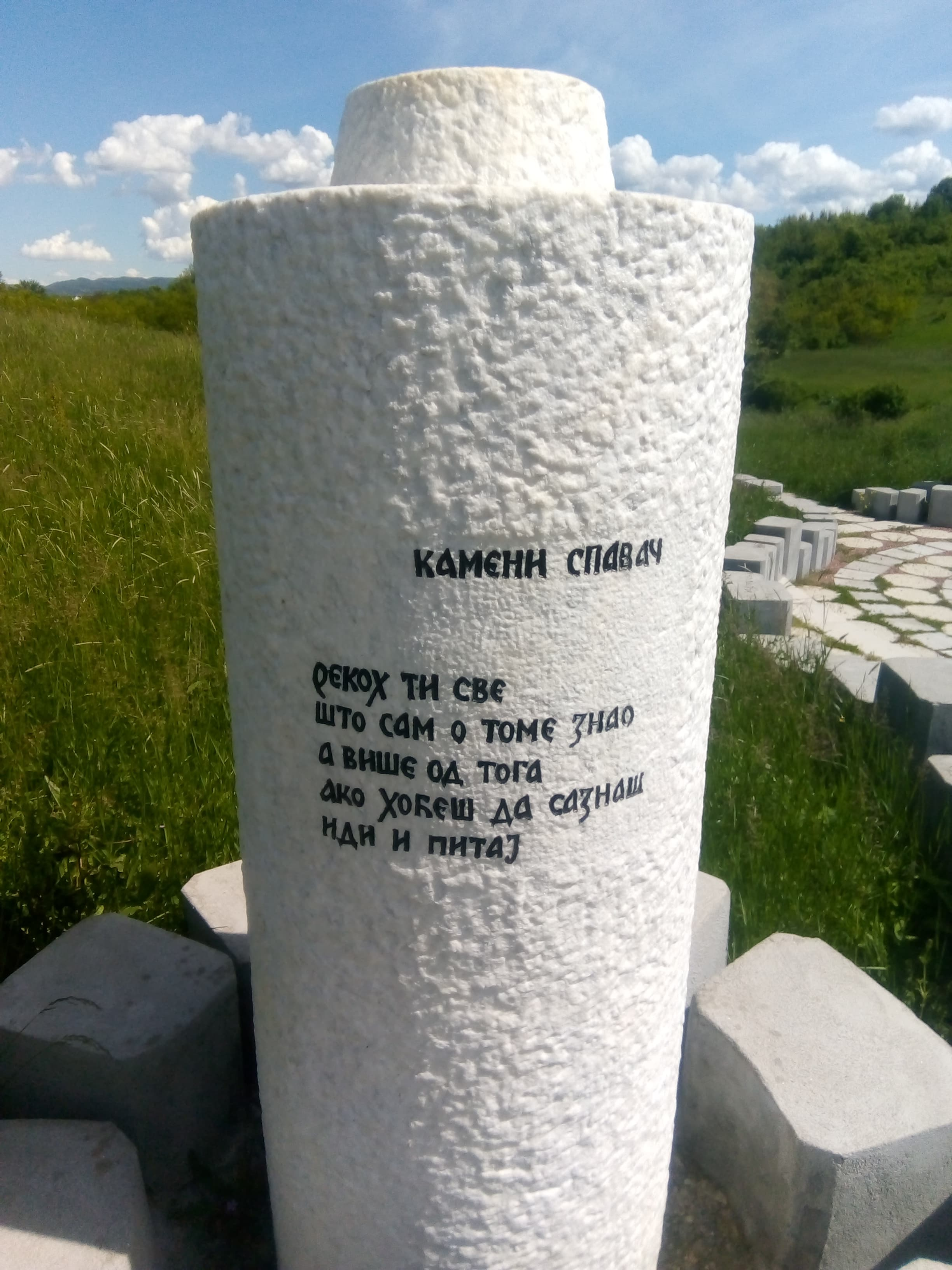 Srpski (latinica): Spomenik "Kameni spavač" u Spomen-parku Kragujevački oktobar